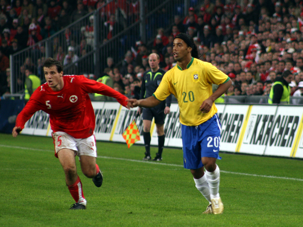 Xavier Margairaz and Ronaldinho, St. Jakob Stadion, Basel (Switzerland), Switzerland - Brasil 1:2